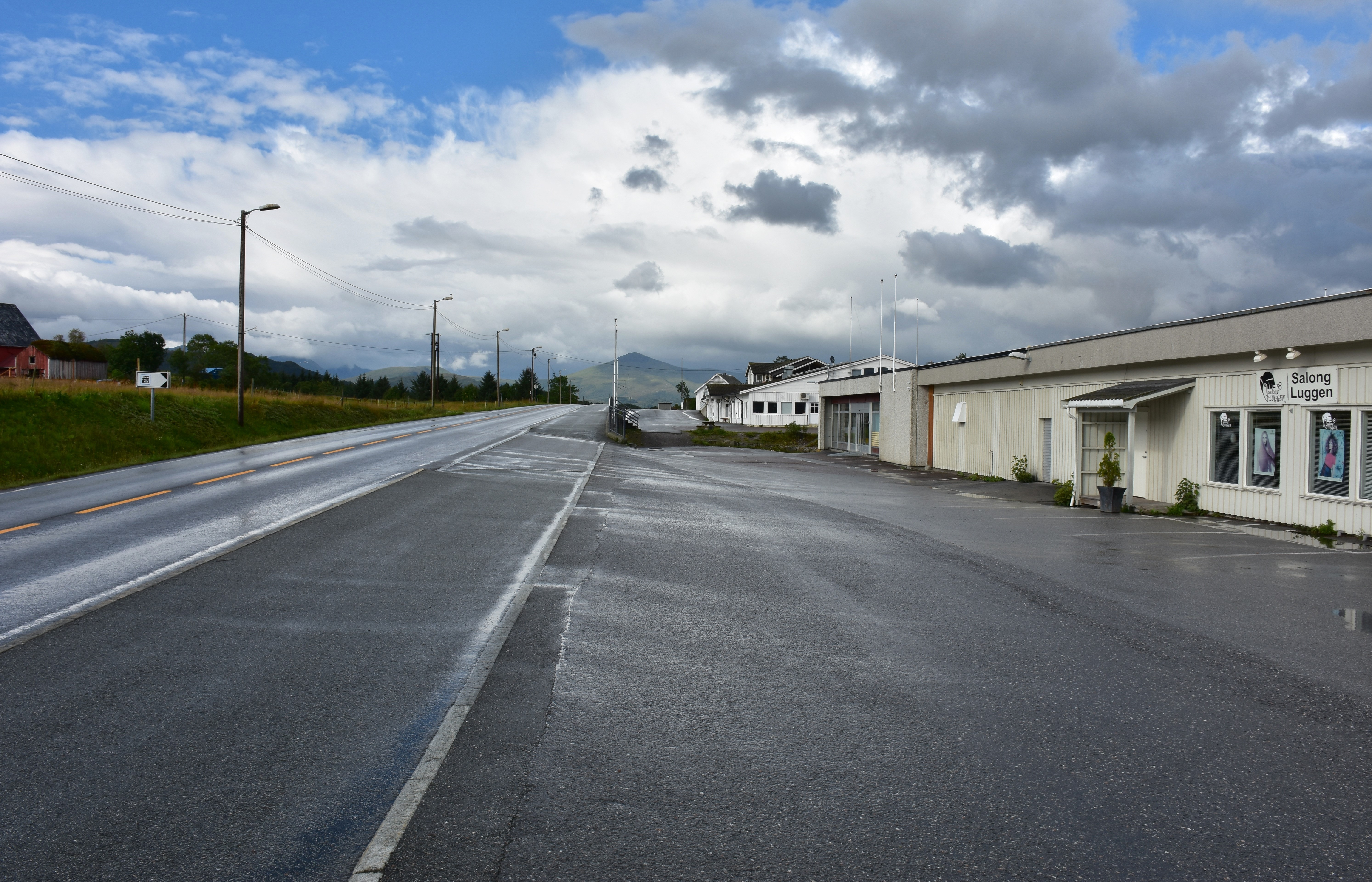 Fylkesvei 64 gjennom Kårvåg i retning Molde